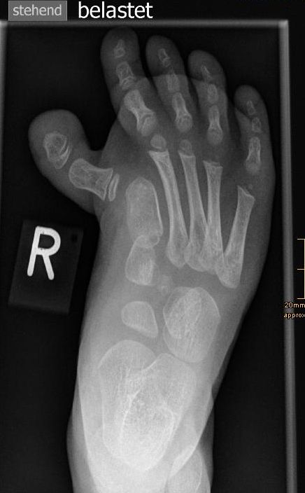 Röntgenaufnahme Fuss a.p. mit Hallux varus congenitus 3 1/2 Jahre altes Kind